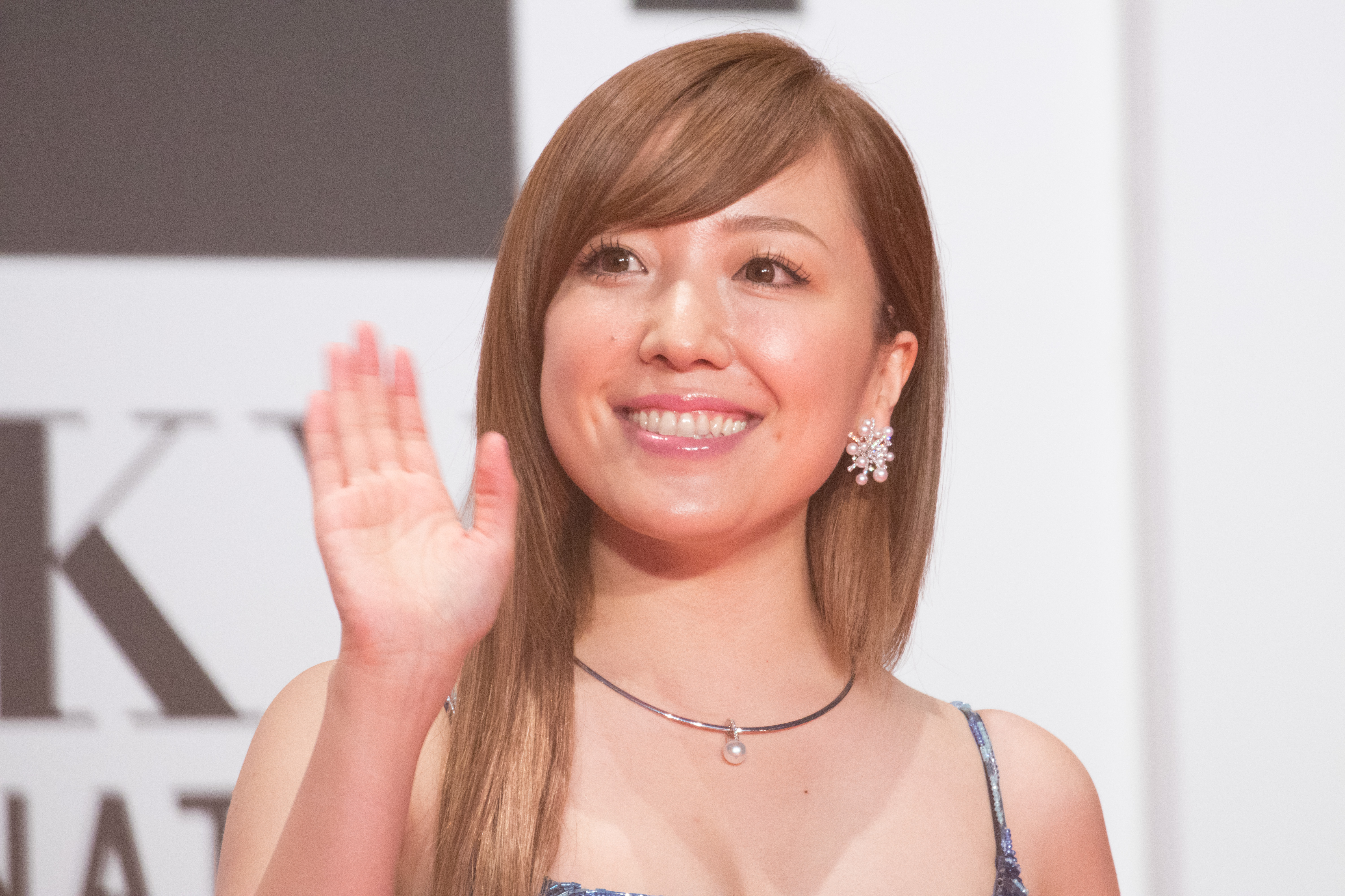 第29回 東京国際映画祭 オープニングセレモニー 平原綾香 (マイ・ベスト・フレンド)